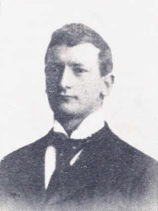 Arne Olai Martinusson Korsbrekke. Ukjent fotograf, fra «Trondhjemsteknikernes matrikel: Biografiske meddelelser om samtlige faste og hospiterende elever av Trondhjems tekniske læreanstalt 1870–1915 med ca. 1300 ungdomsportrætter» (1916), s. 179.